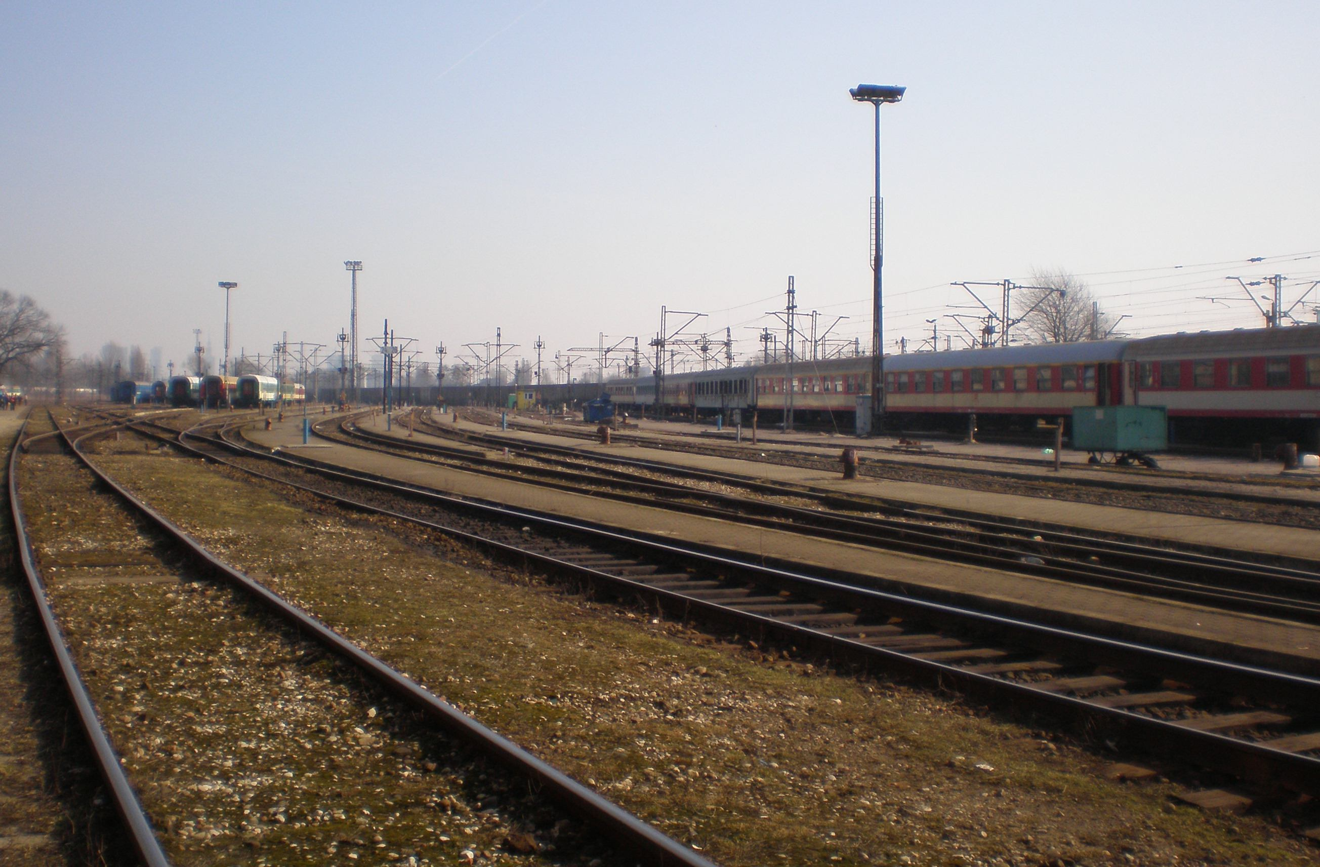 Tory odstawcze PKP Intercity na terenie stacji postojowej Warszawa Szczęśliwice.